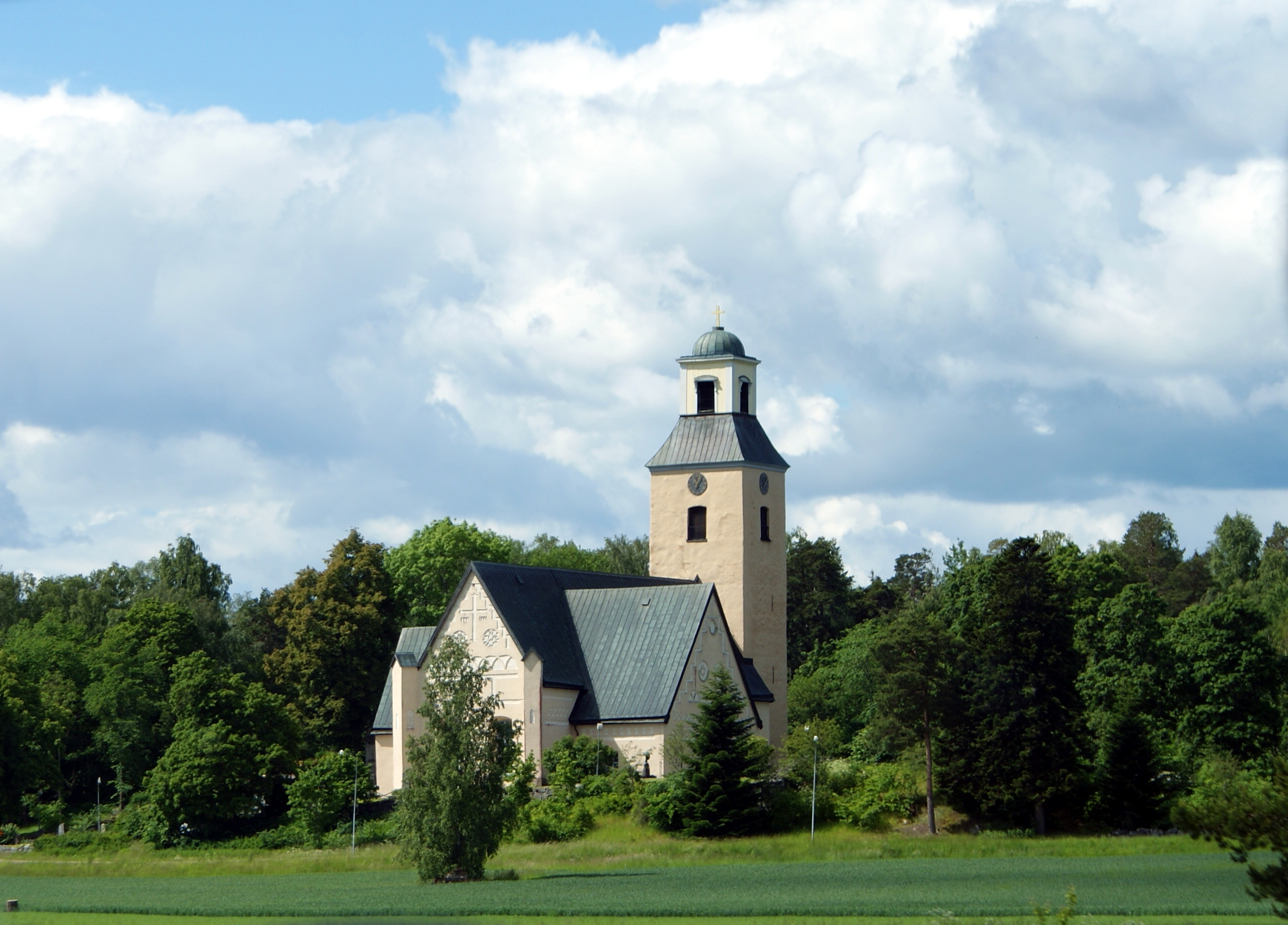 Rasbo kyrka sedd från länsväg 288